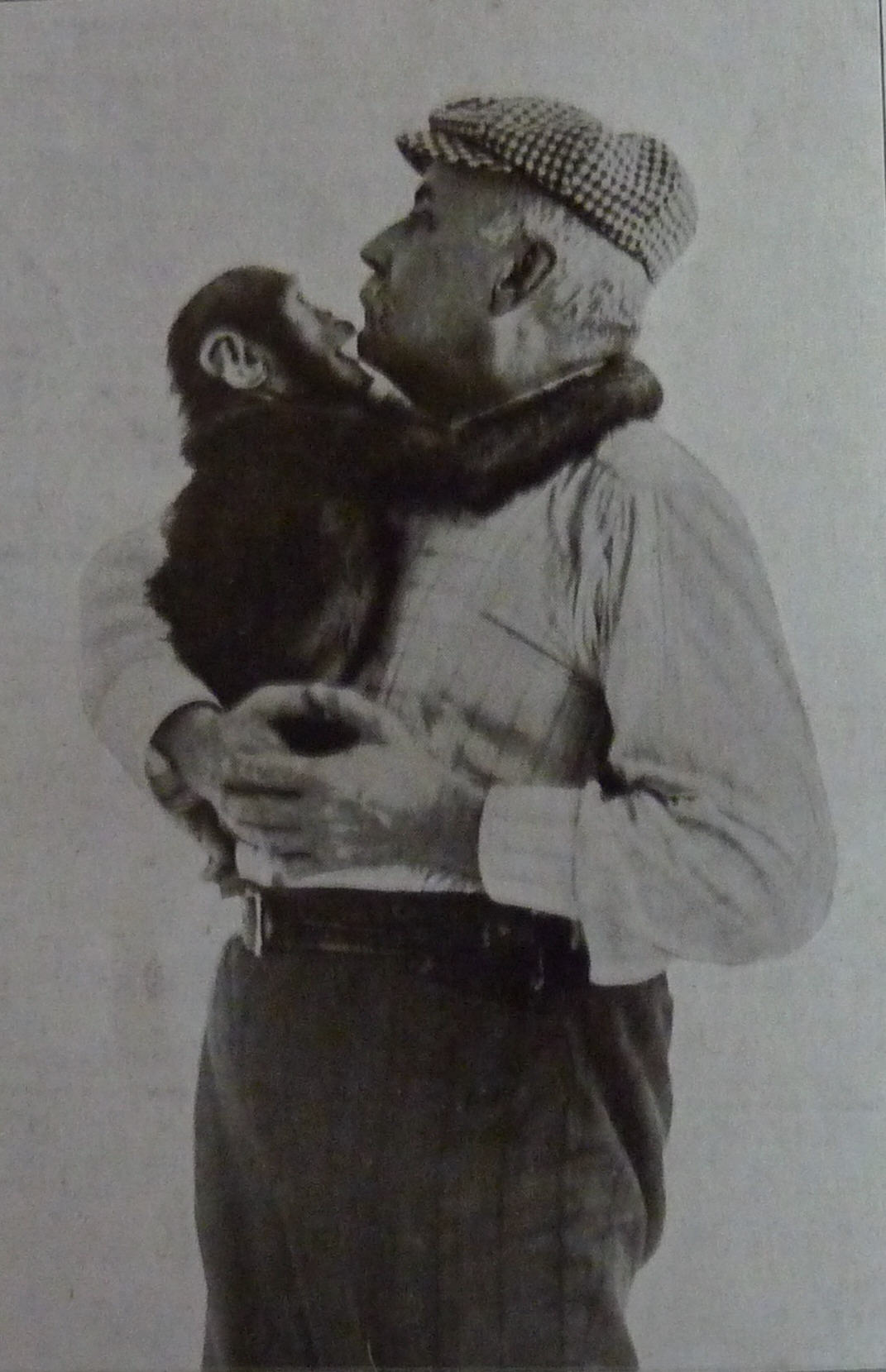 R. L. Garner und seine Schülerin Susie